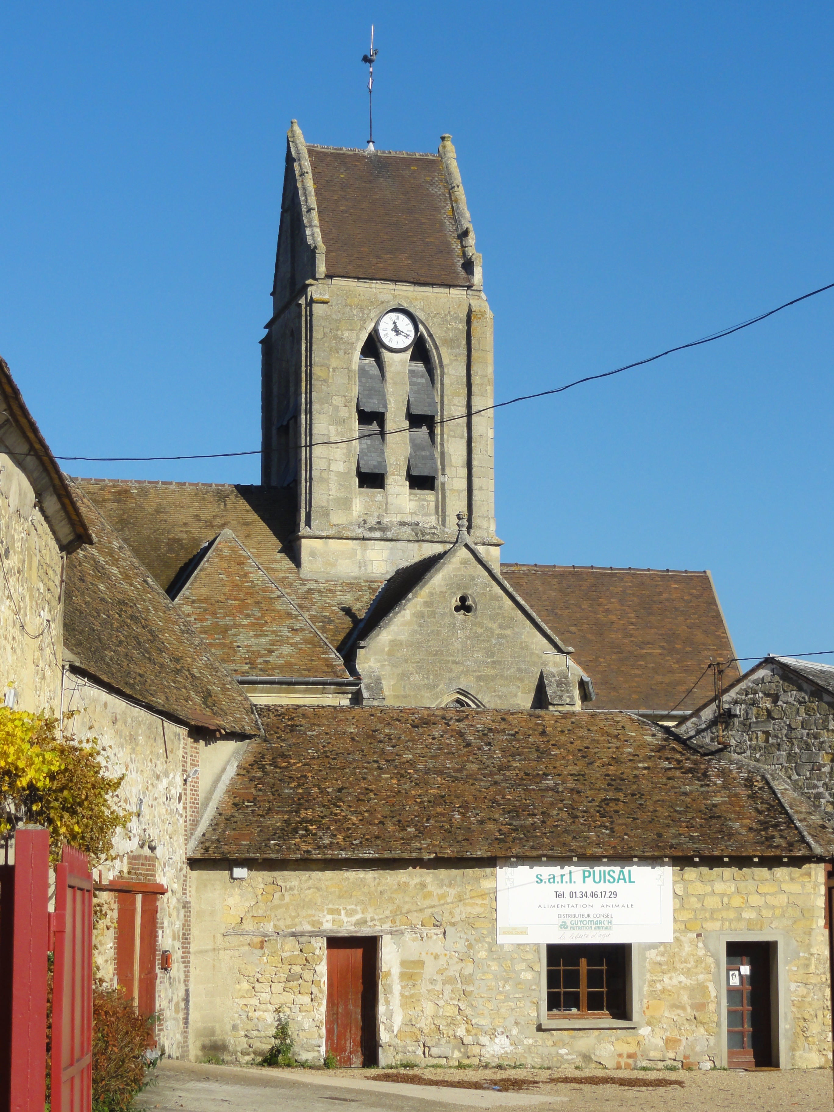 Église Saint-Pierre de Puiseux-Pontoise - voir titre.